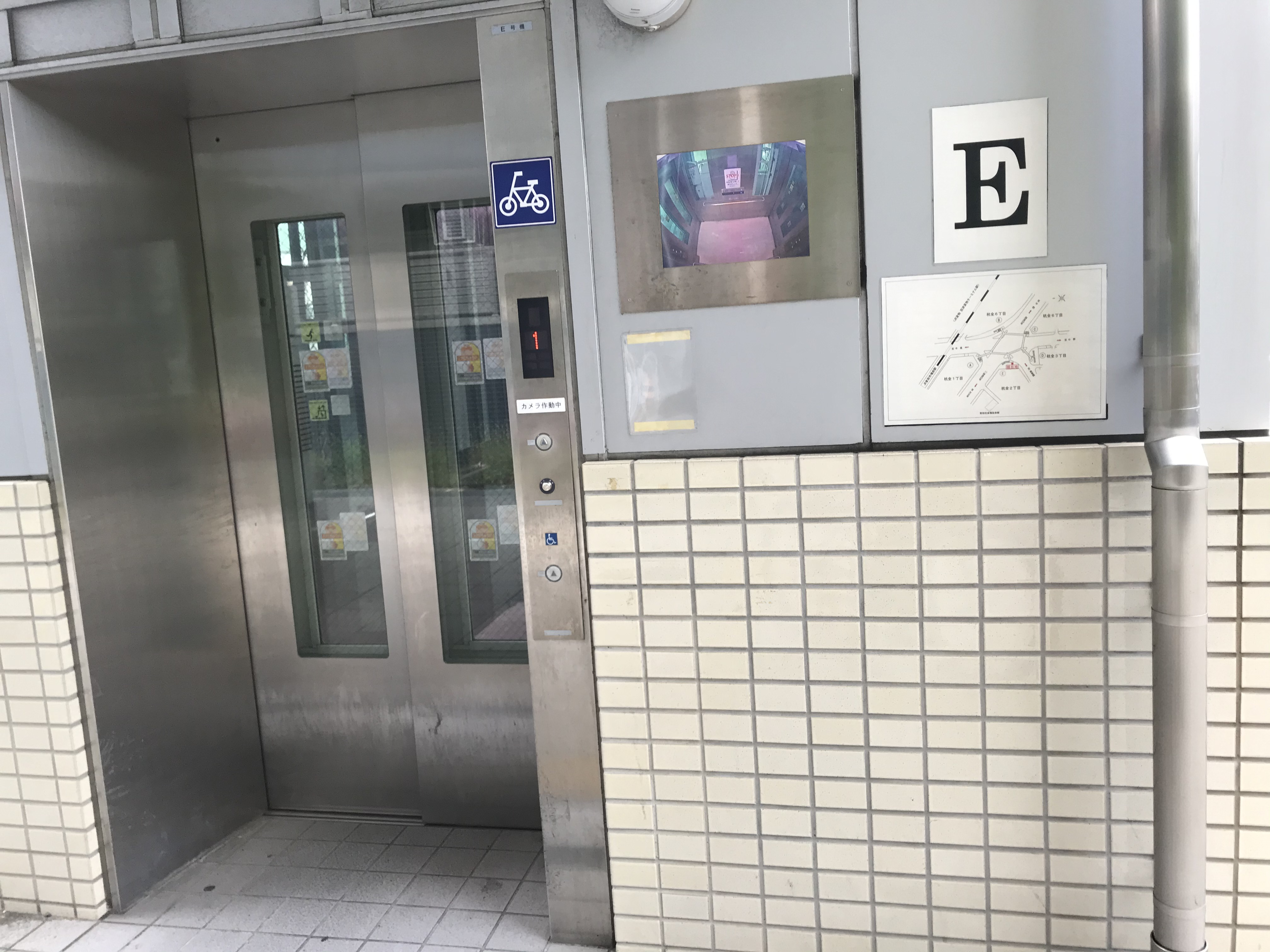 大きく複雑な交差点のためすべての角にエレベーターが設置